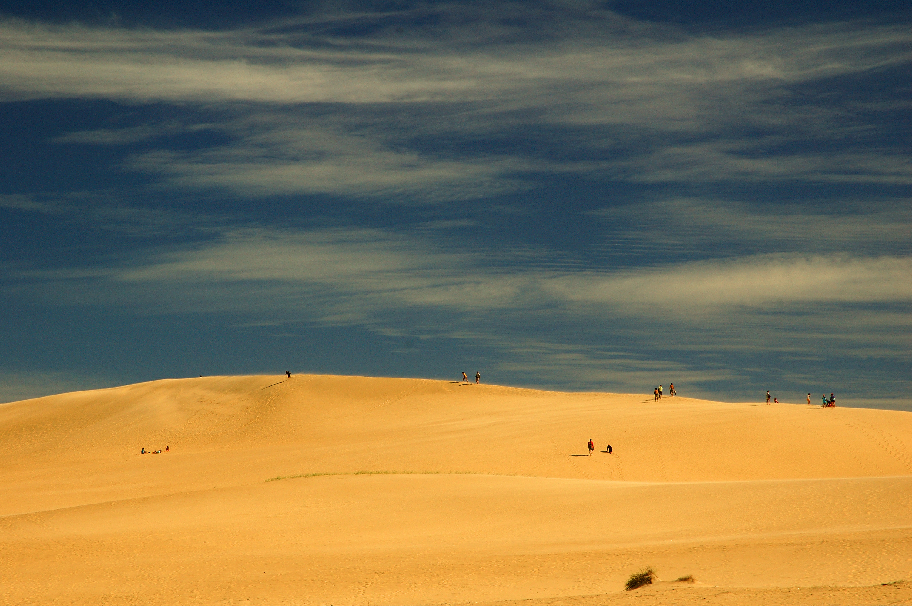 Dunas de arena situadas entre los balnearios Valizas y Cabo Polonio, Uruguay (enero de 2006). Author: Fernando da Rosa